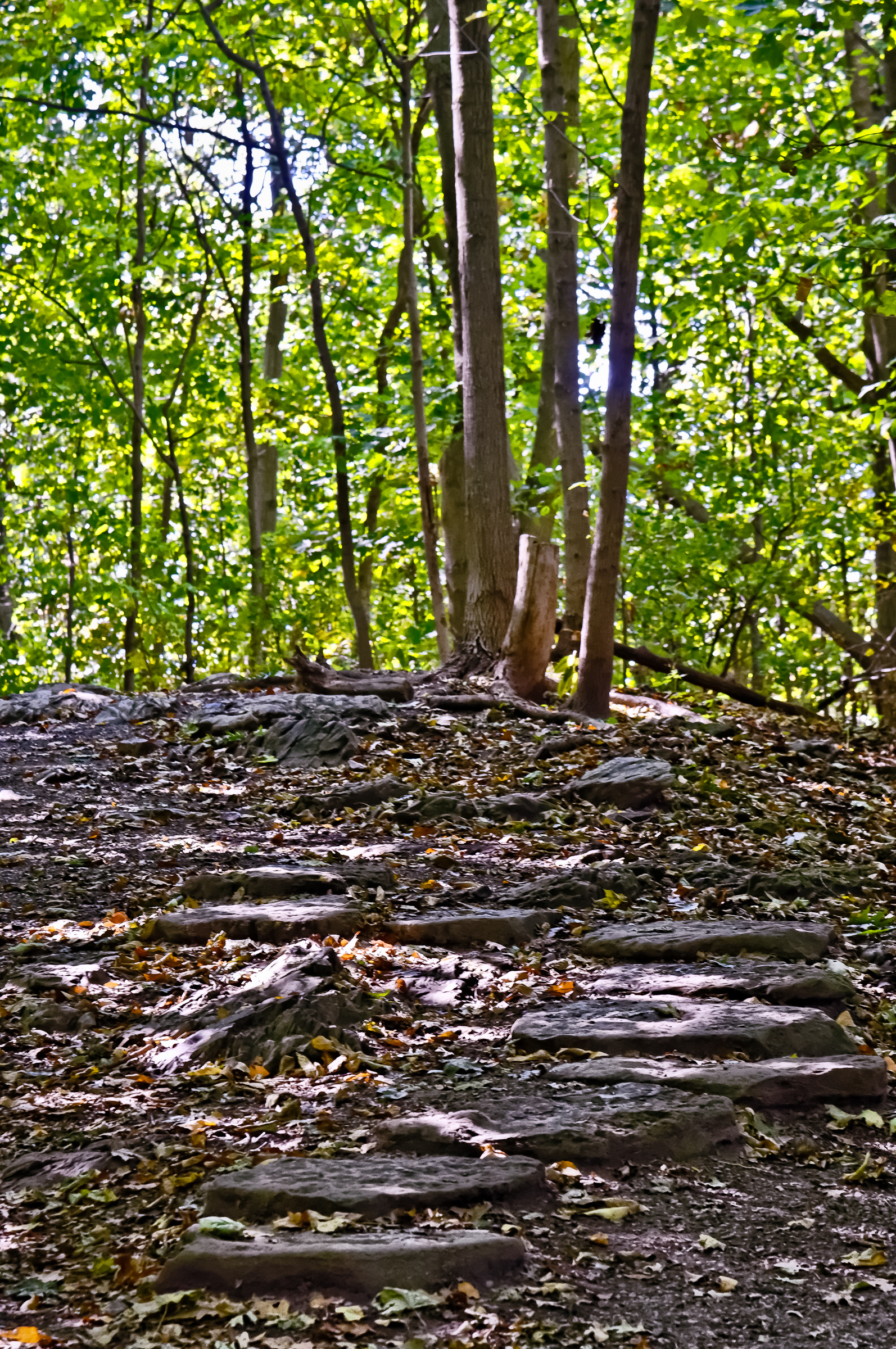 Arrondissement historique et naturel du Mont-Royal, , WestmountMontréal (Canada). (Protection AN décrétéAH décrété. Voir la liste des lieux patrimoniaux de Montréal (région administrative) pour plus de détails).